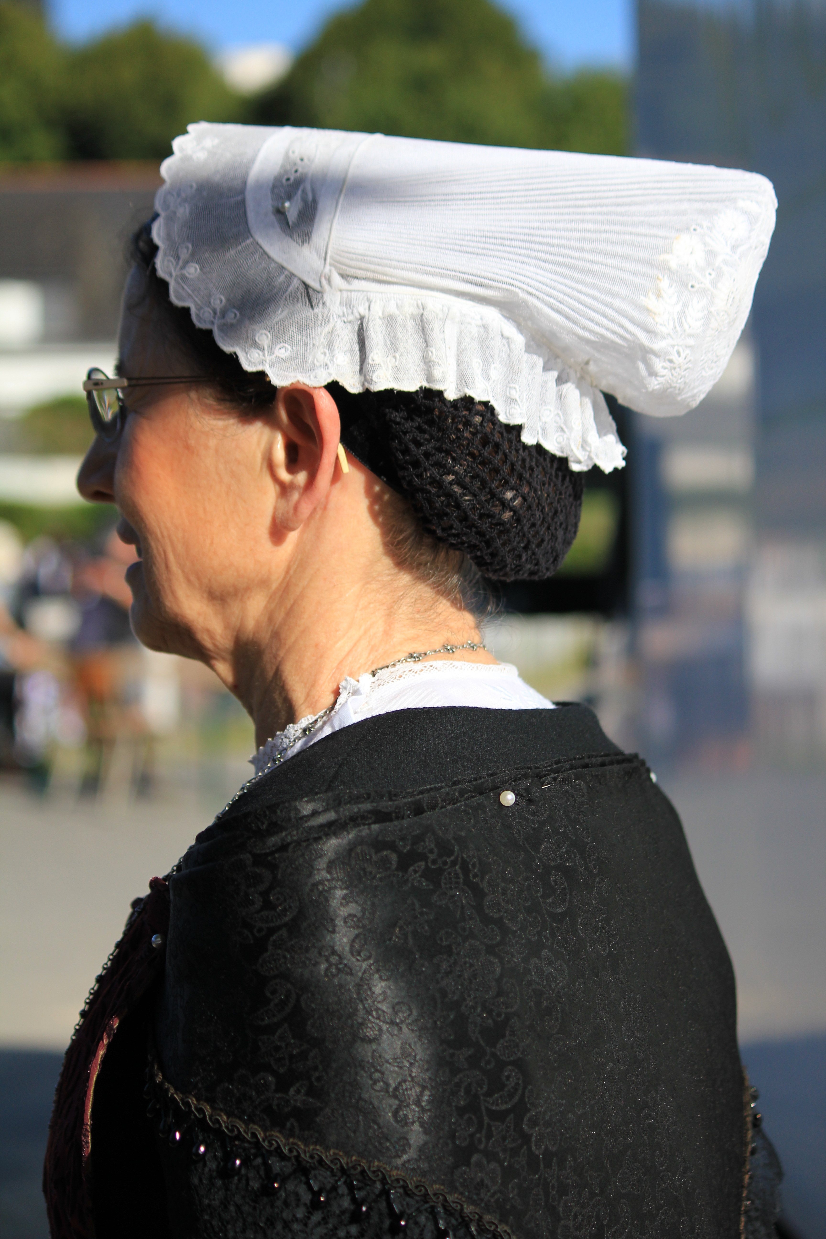 Cercle celtique Olivier de Clisson lors de la grande parade du festival interceltique de Lorient 2013. Coiffe du Pays du Vignoble nantais.